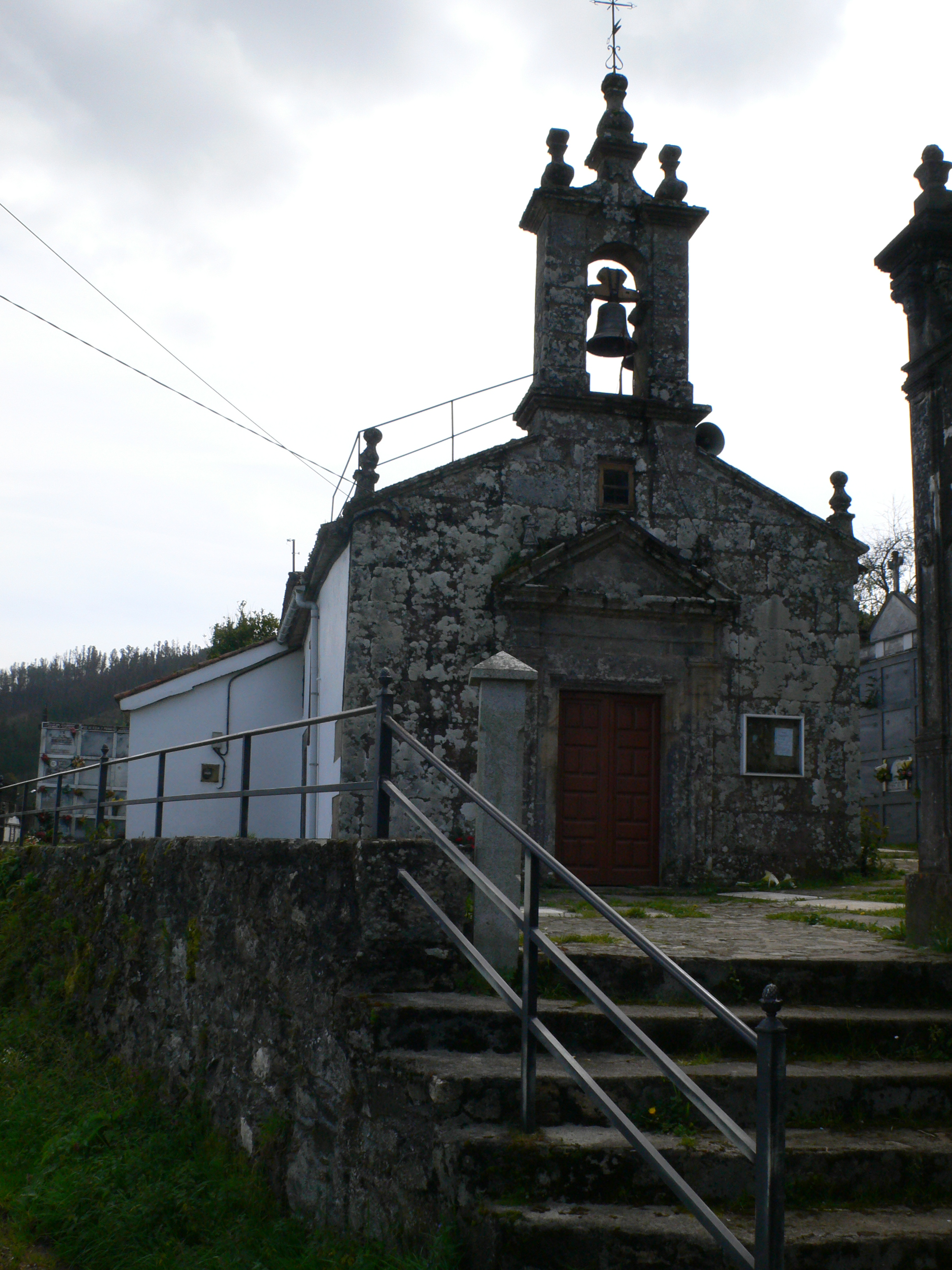 Igrexa de Santa María de Ollares, Vila de Cruces